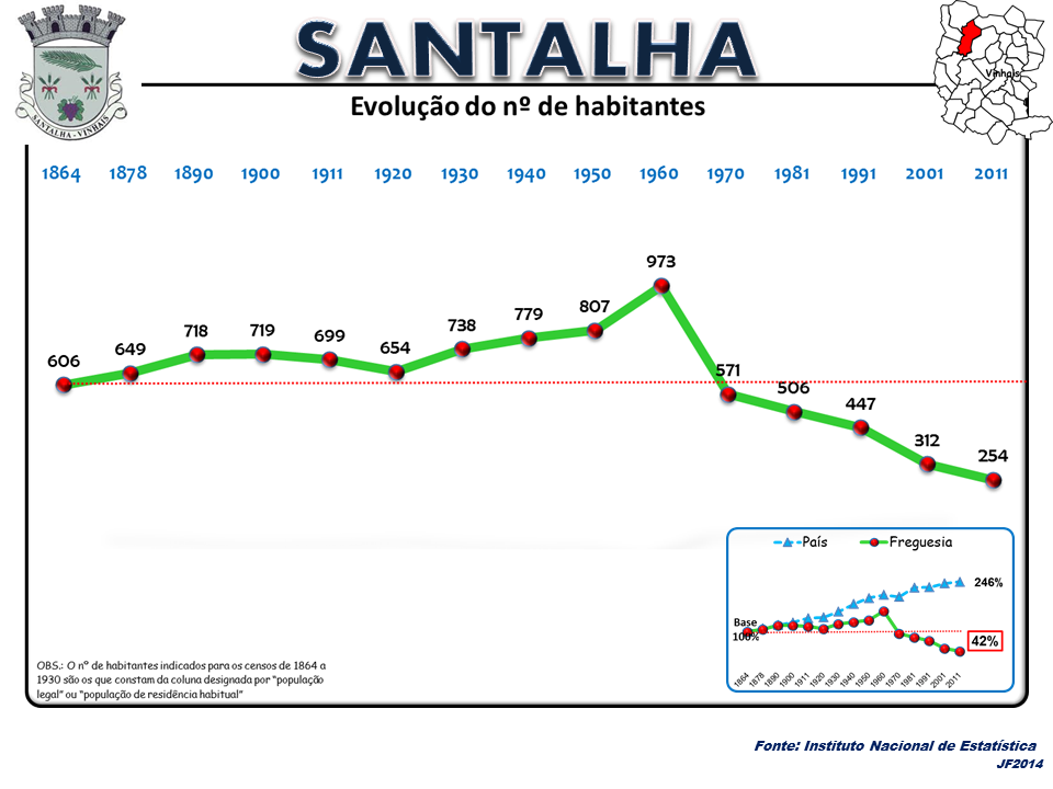 Evolução da População 1864 / 2011